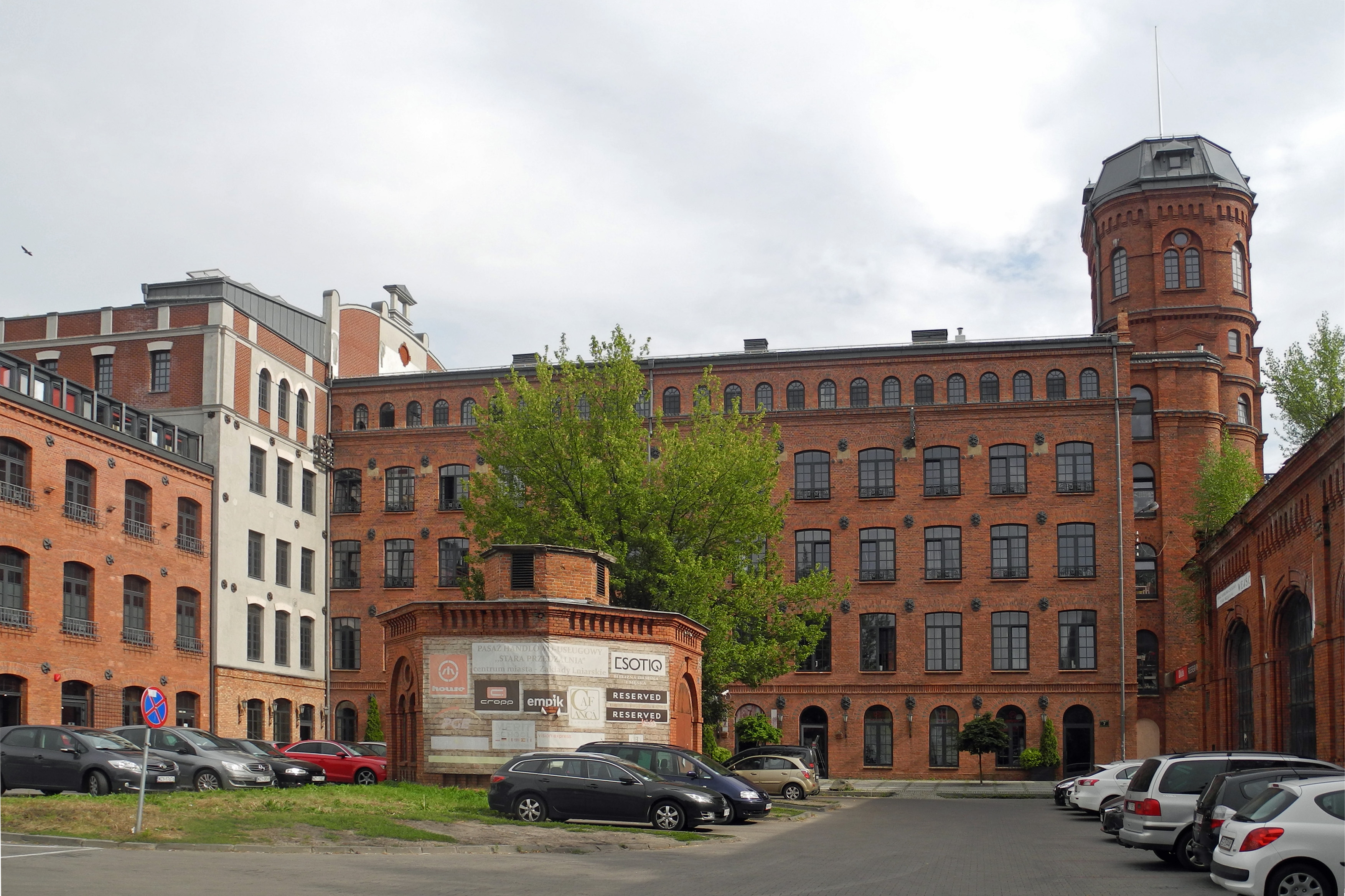 Alte Spinnerei – Stara Przędzalnia in Żyrardów, errichtet 1833, Architekt: Jan Jakub Gay (1801–1849), nach dem Umbau zum Wohn- und Servicegebäude 2005 bis 2009 durch die Familie Anna und Piotr Błażejewski